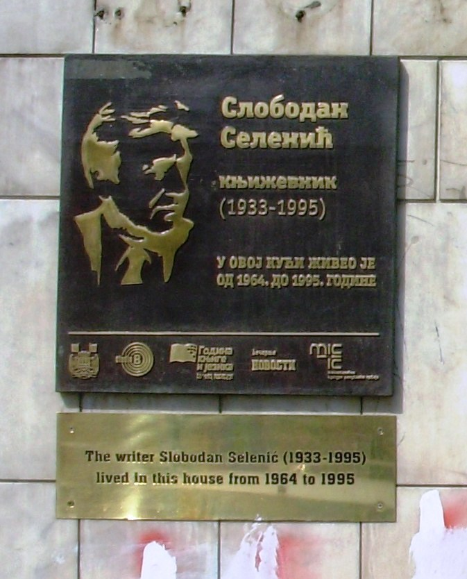 Slobodan Selenić, tabla na zgradi ge je stanovao, Studentski trg, Beograd. Slikao Goldfinger